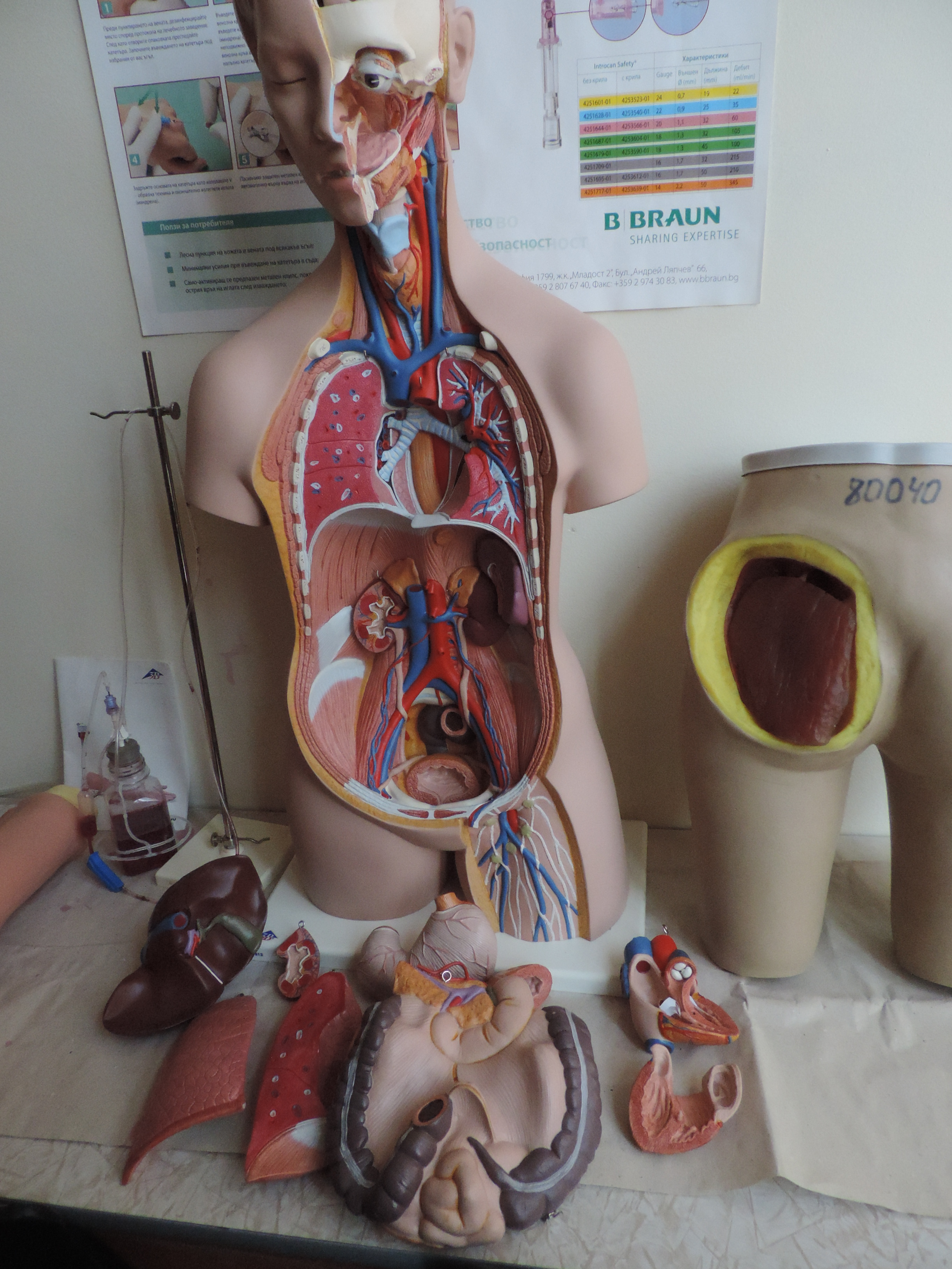 Университет „Проф. Асен Златаров“, Бургас, Факултет по обществени науки, Катедра „Здравни грижи“. Мулаж.